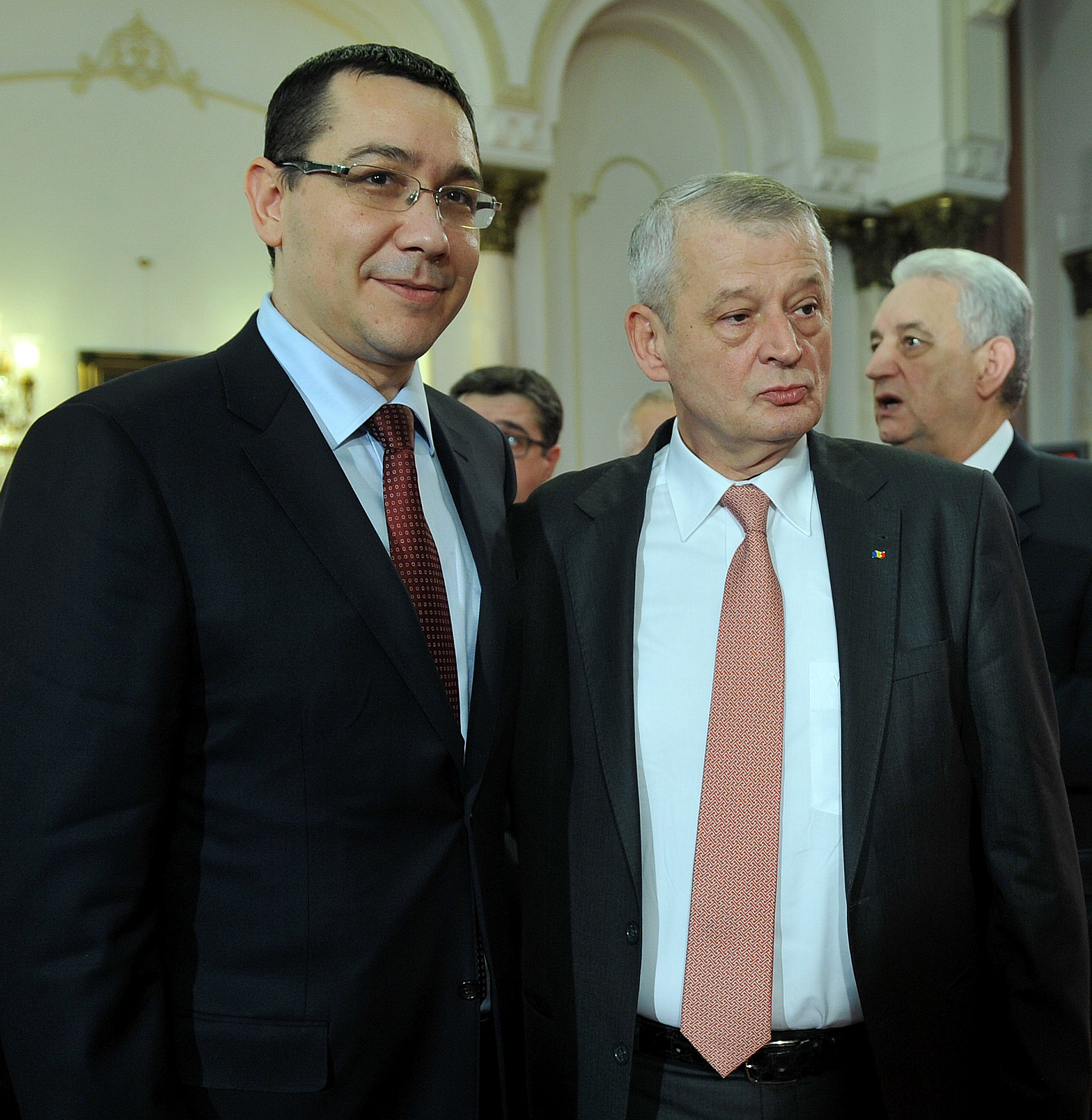 Victor Ponta si Sorin Oprescu la semnarea protocolului de infiintare a USD - 10.02.2014